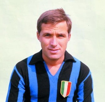 Saul Malatrasi (F.C. Internazionale Milano)